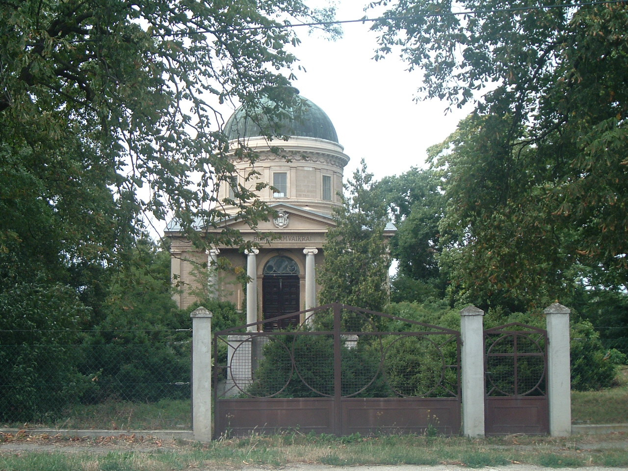 Szapárys' Mausoleum, Sorokpolány